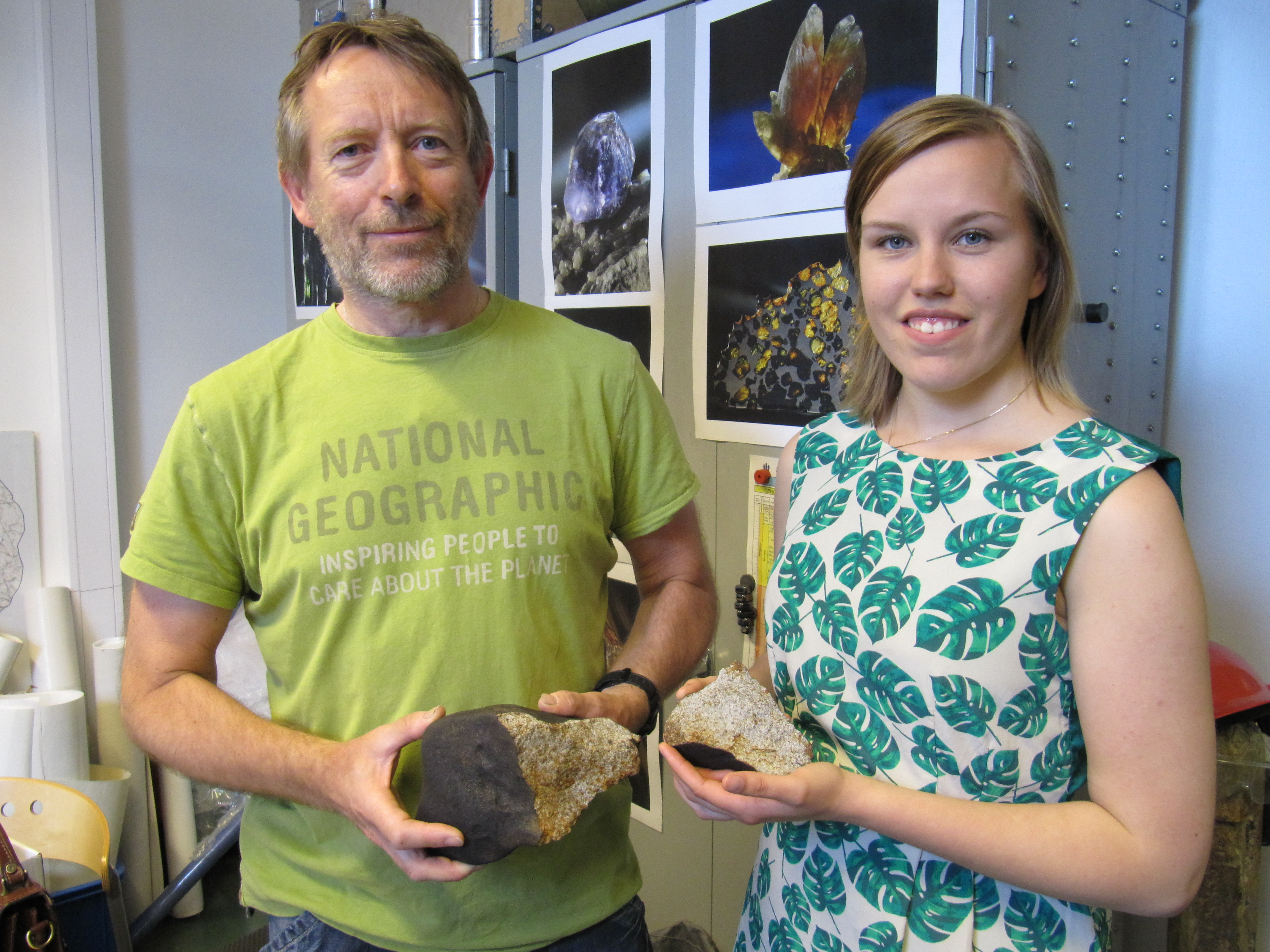 Terje Fjeldheim og datter Inger-Maren med Valle-meteoritten